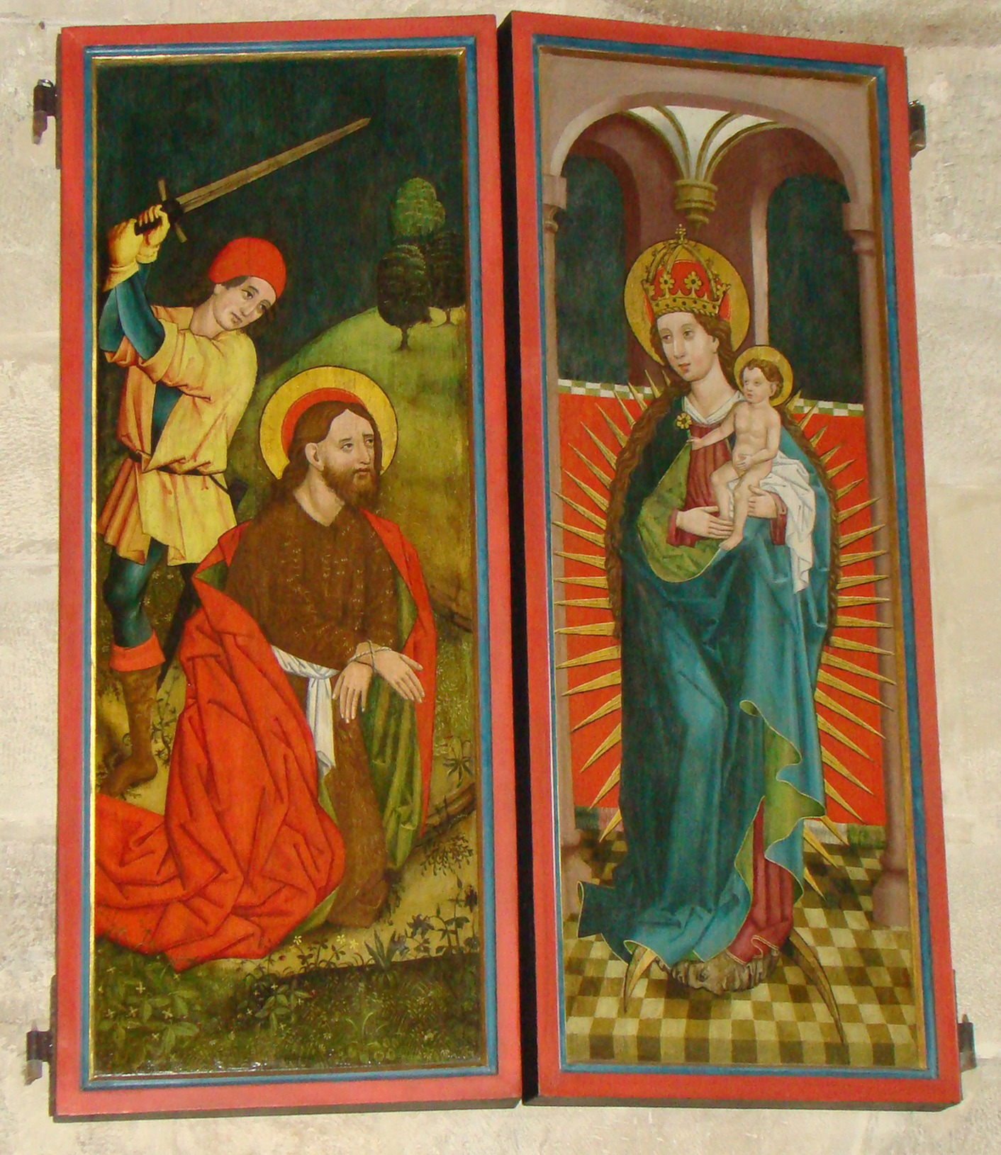 Stadtkirche Schwaigern, Johanneslaltar